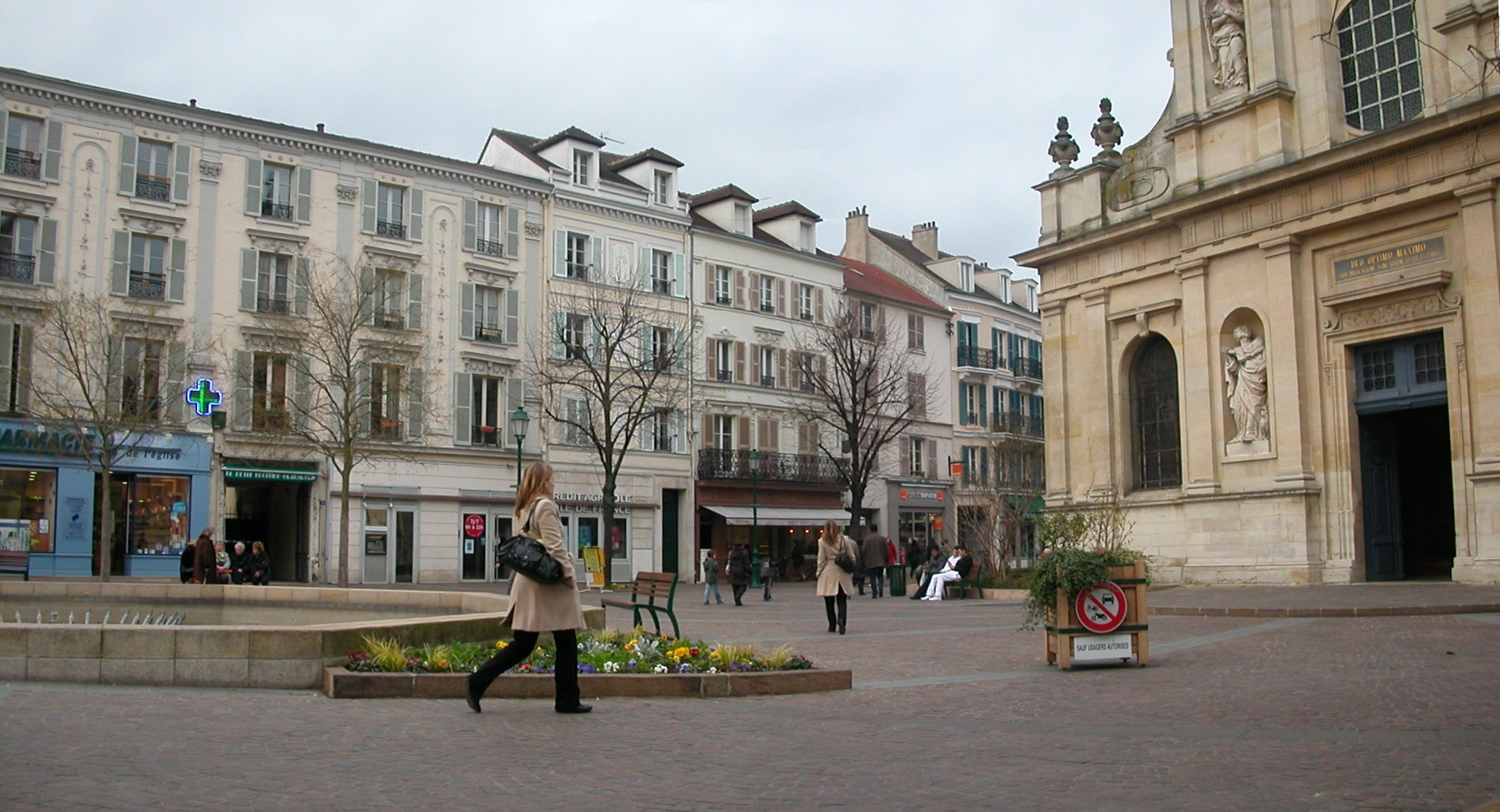 Place de l'Église à Rueil-Malmaison